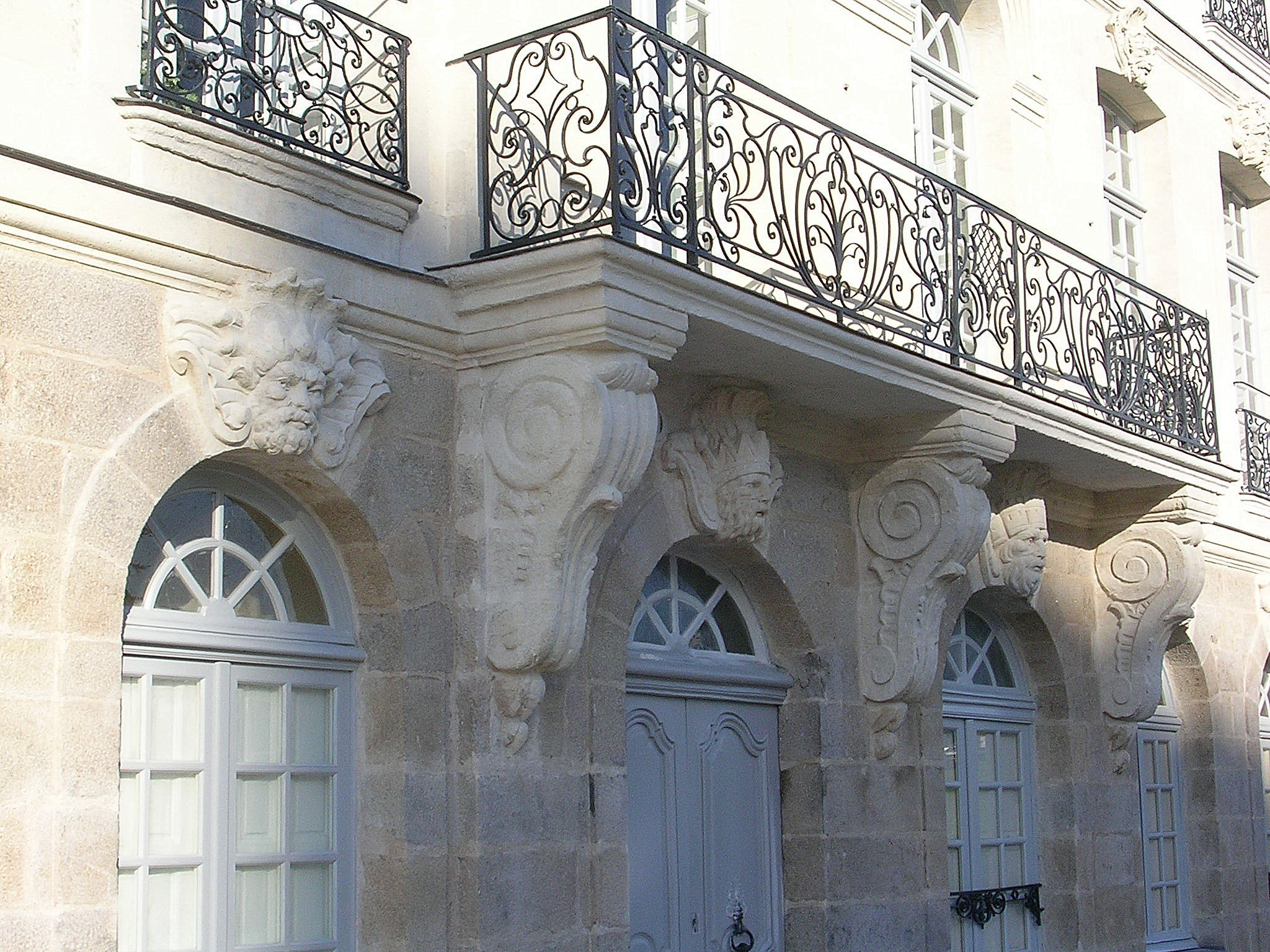 Ile Feydeau, Nantes (France). Photo prise par Jibi44